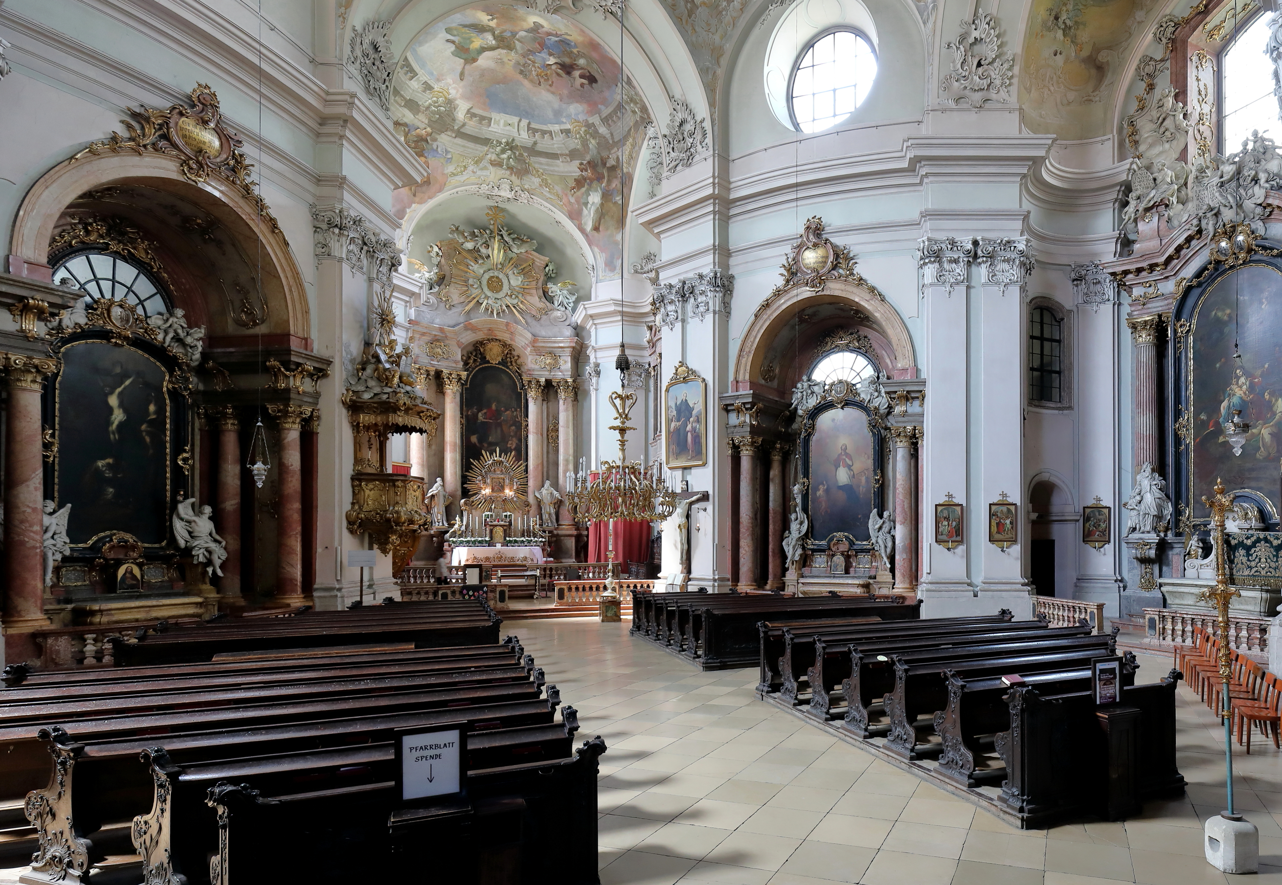 Innenansicht der Piaristenkirche Maria Treu am Jodok-Fink-Platz im 8. Wiener Gemeindebezirk Josefstadt.Die Baugeschichte der Kirche ist mangels archivalischer Unterlagen gering dokumentiert. Von 1716 bis 1721 dürfte nach Entwürfen von Johann Lucas von Hildebrandt der Rohbau errichtet worden sein. In einer 2. Bauphase dürfte dann bis 1756 der Innenausbau und die Innenausstattung fertiggestellt gewesen sein.